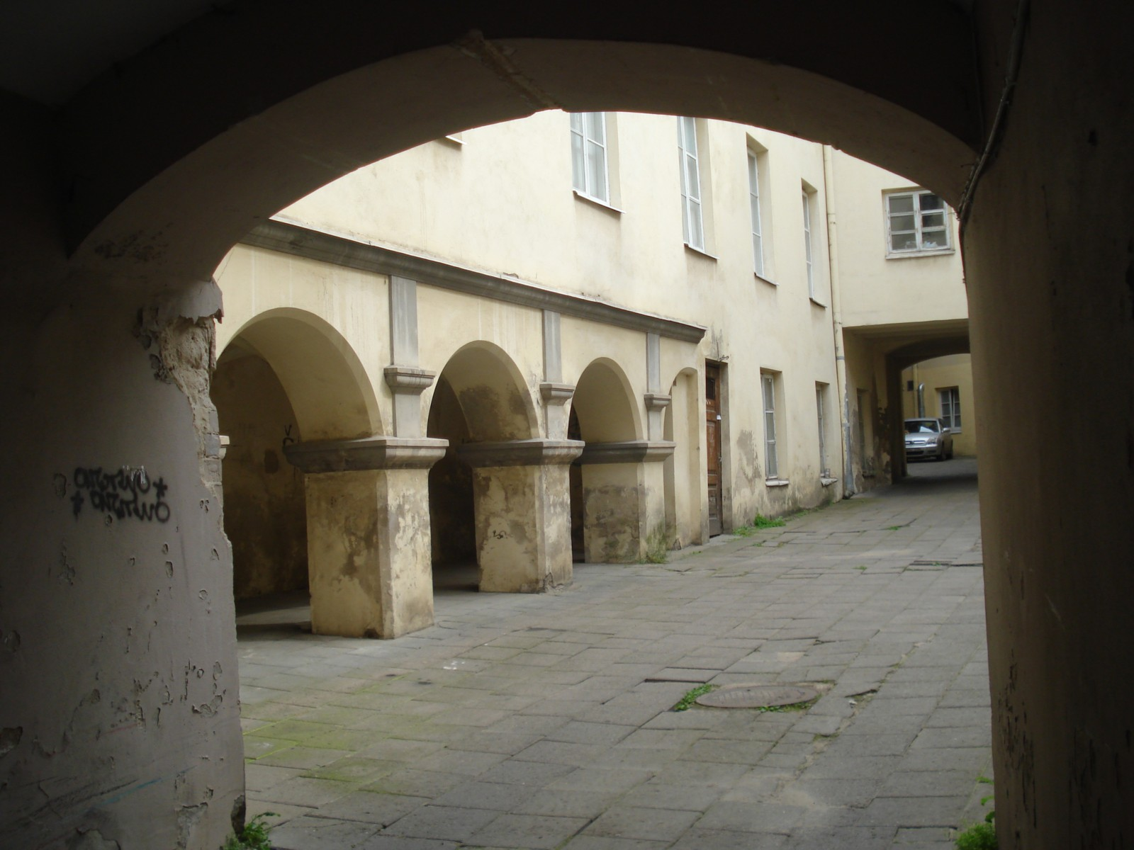 Дворец Гурецких. Вильнюс, Доминикону 15 / Гаоно 1. Двор с аркадой